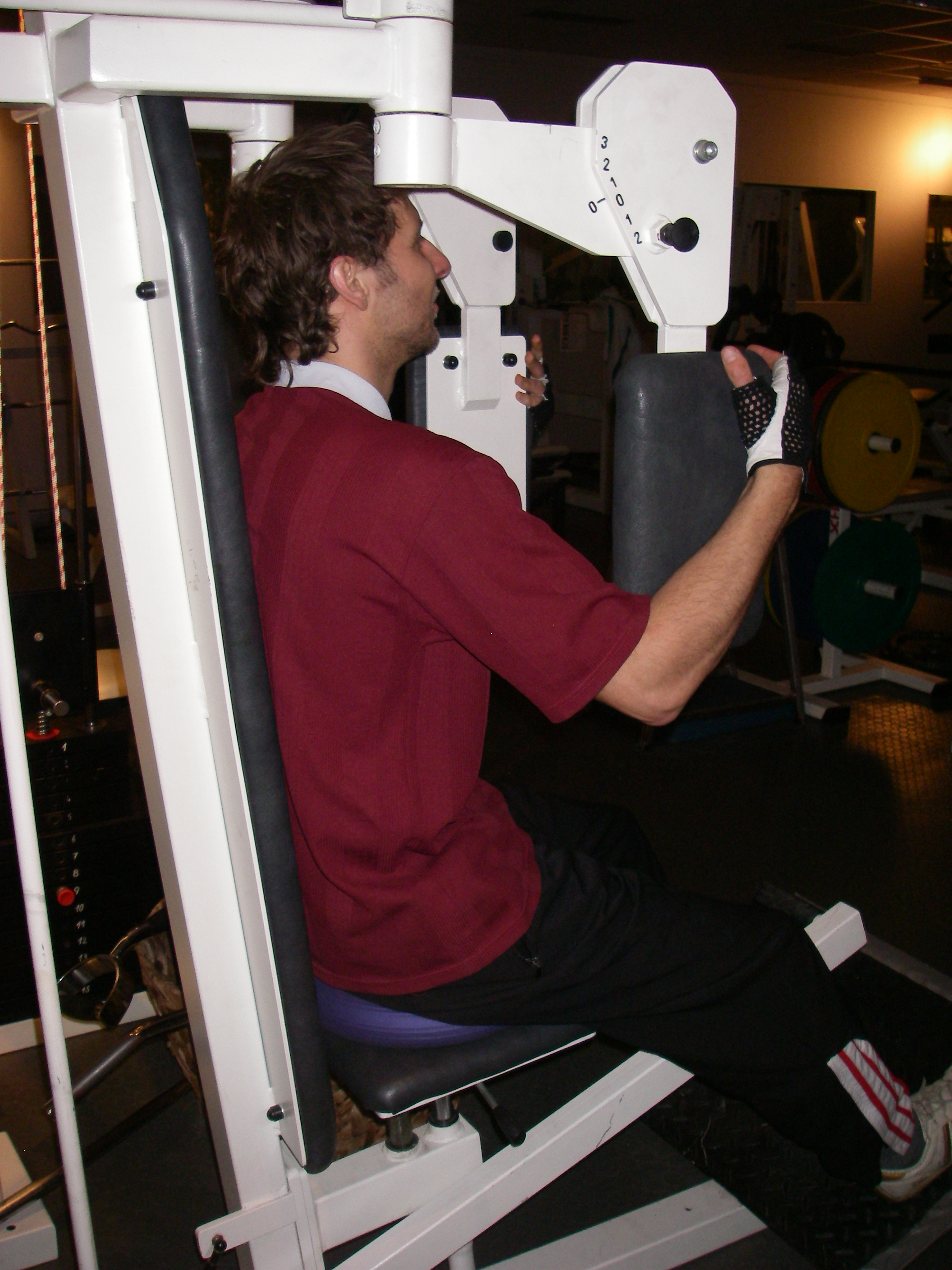 Ballkissen als Unterlage beim Fitnesstraining in einem Nürnberger Fitnessstudio